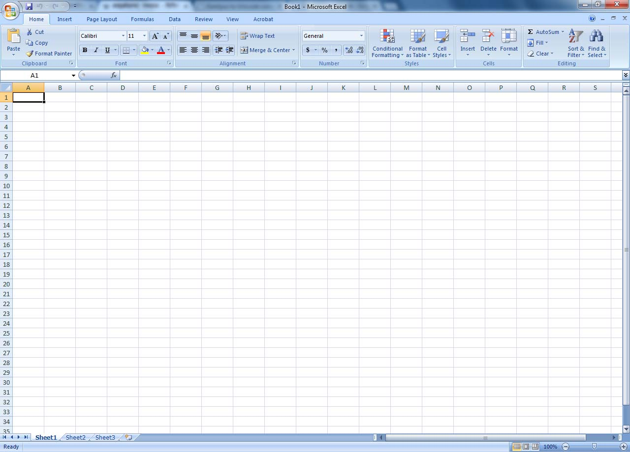 नेपाली: माइक्रोसफ्ट एक्सल खोल्दा स्क्रीनमा यस्तो देखिन्छ ।